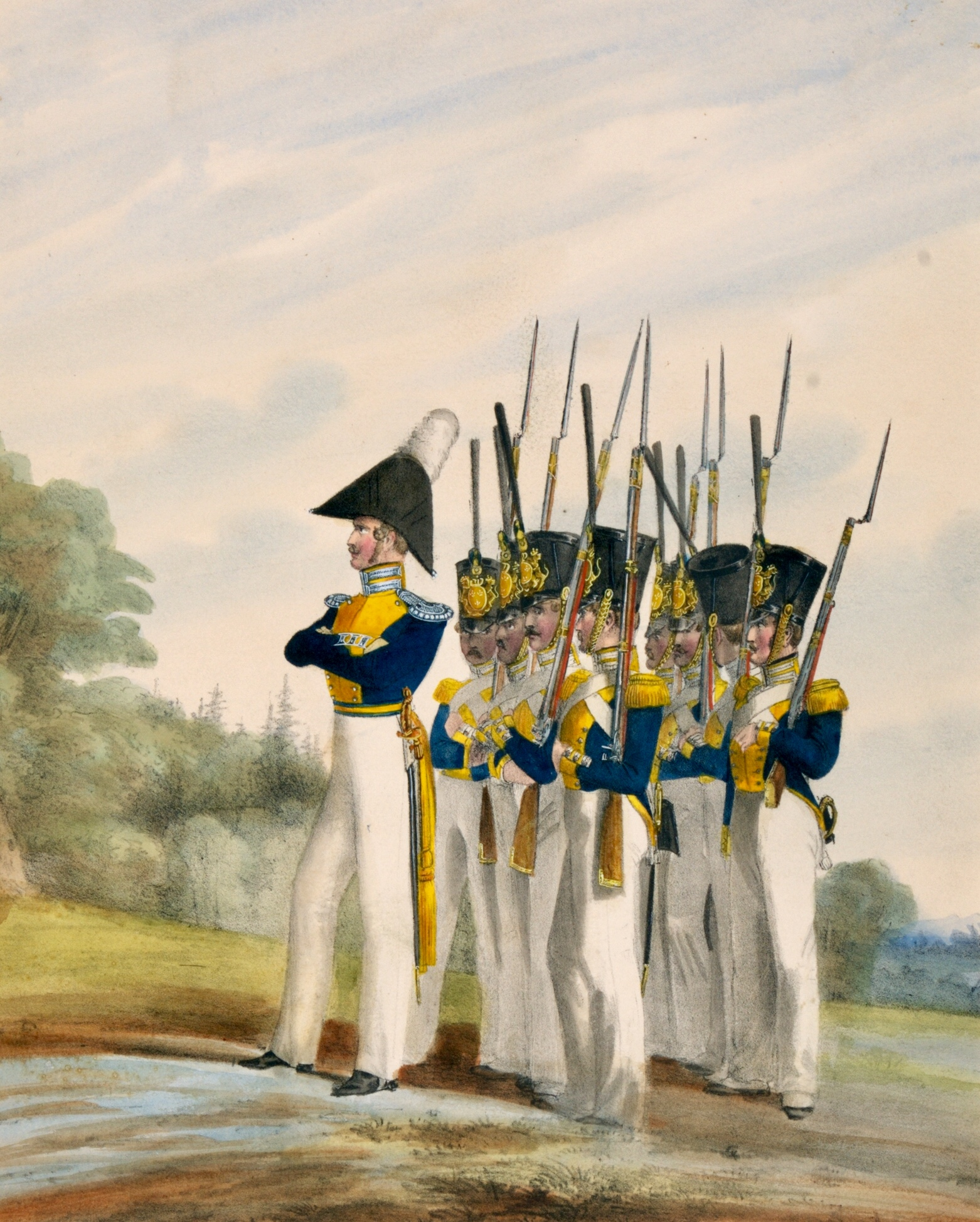 Tillhör Armemuseum